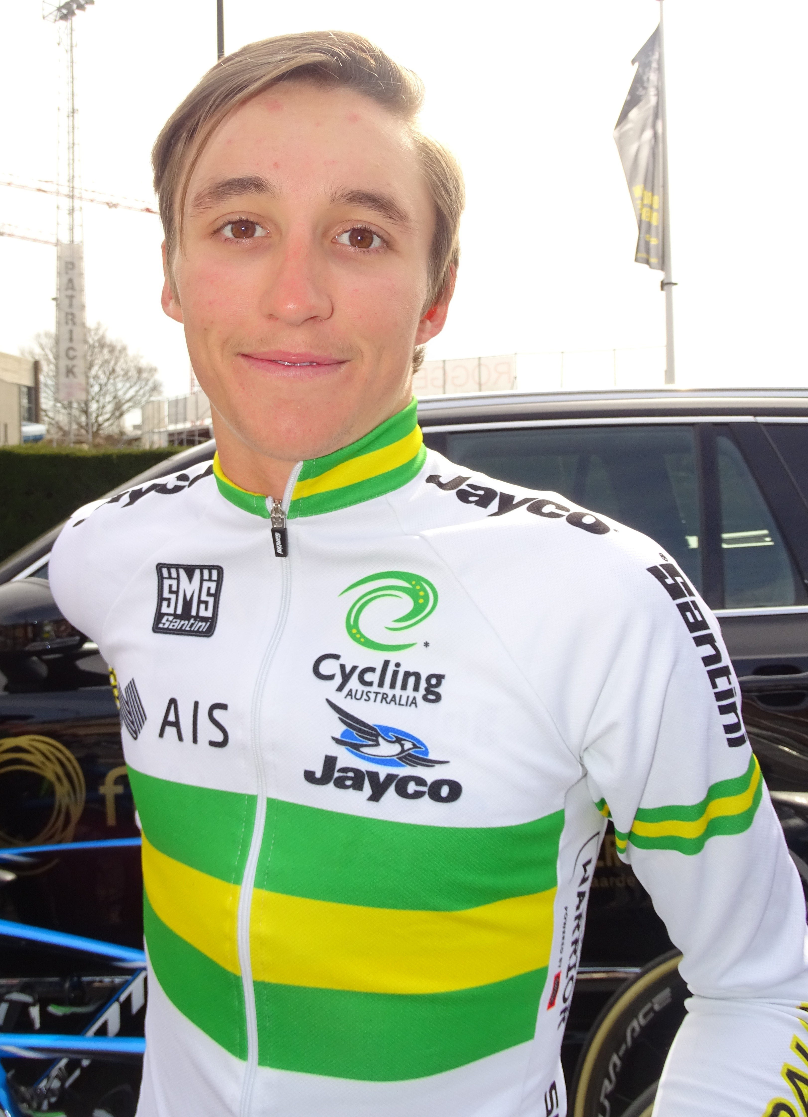 Reportage réalisé le samedi 9 avril à l'occasion du départ et de l'arrivée du Tour des Flandres espoirs 2016 à Audenarde, Belgique.